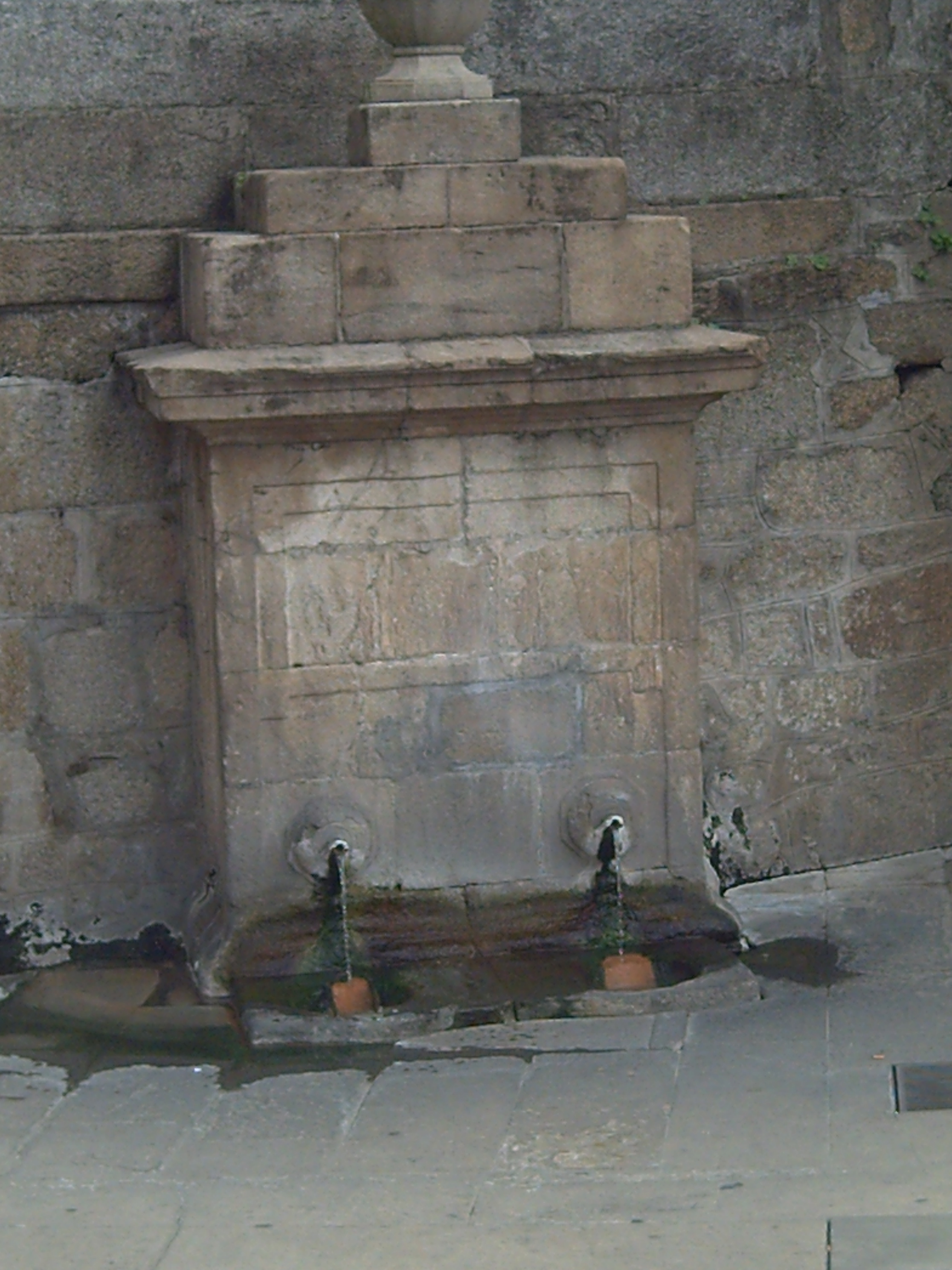 Burga de Arriba, (Ourense)